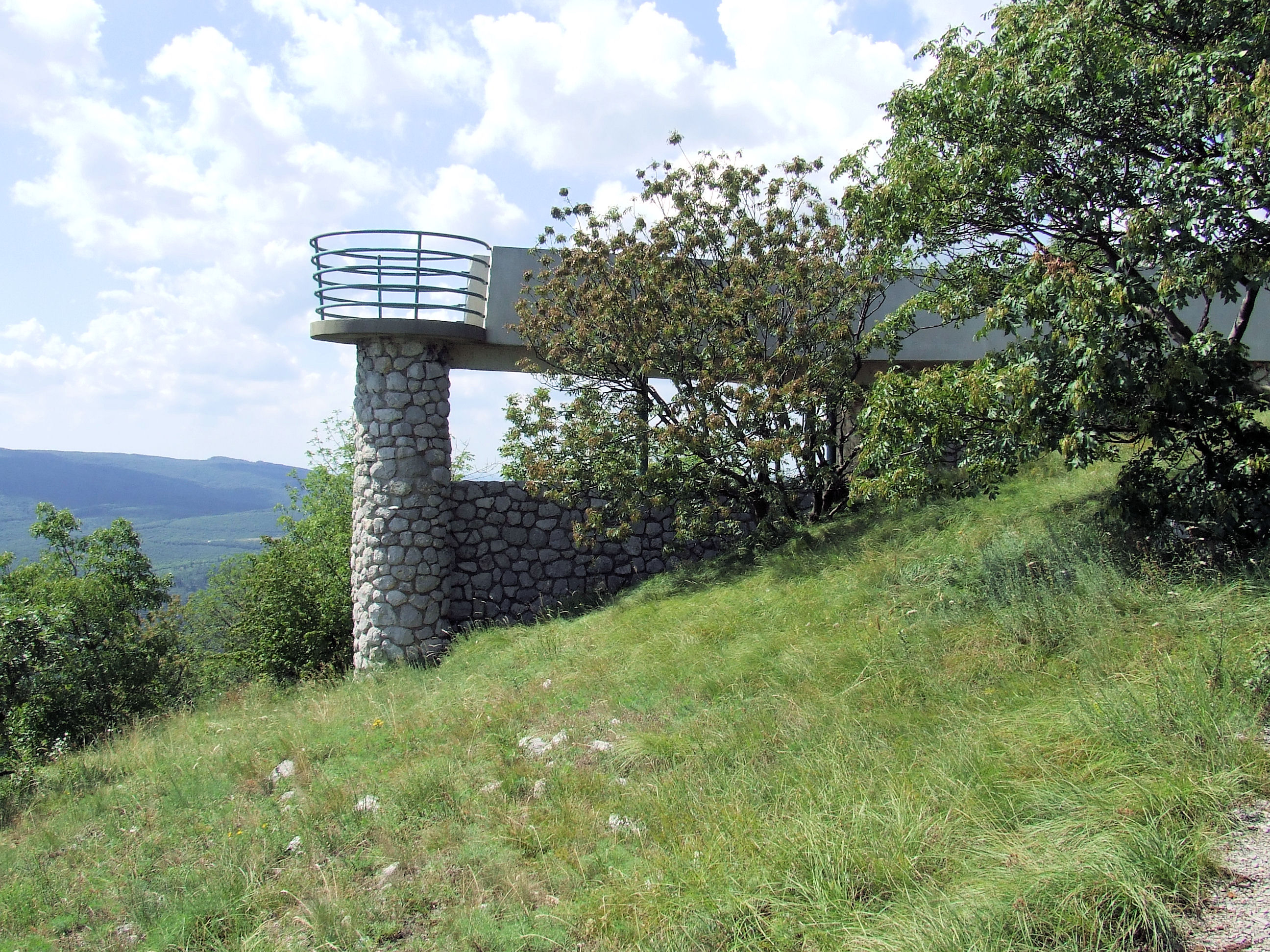 Kilátó a Kis-Tubesen (Mecsek, 577 m) Épült Kiss Tibor tervei alapján 1959-ben